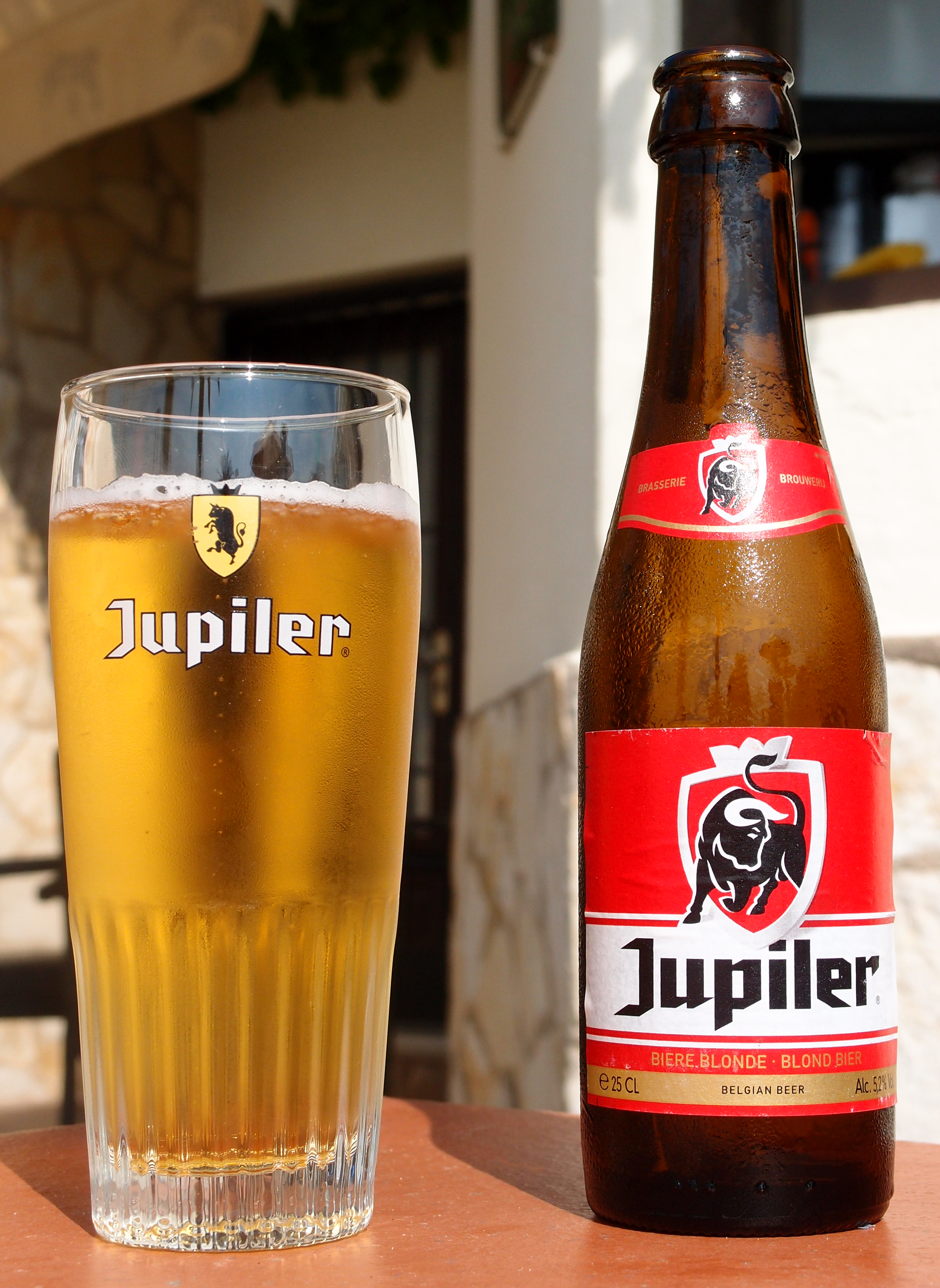 Jupiler im Originalglas - belgisches Bier der Brauerei "Anheuser-Busch InBev" Datum: 08.09.2012 Urheber: M. Pfeiffer alias Benutzer:Gordito1869 Quelle: privates Fotoarchiv des Urhebers